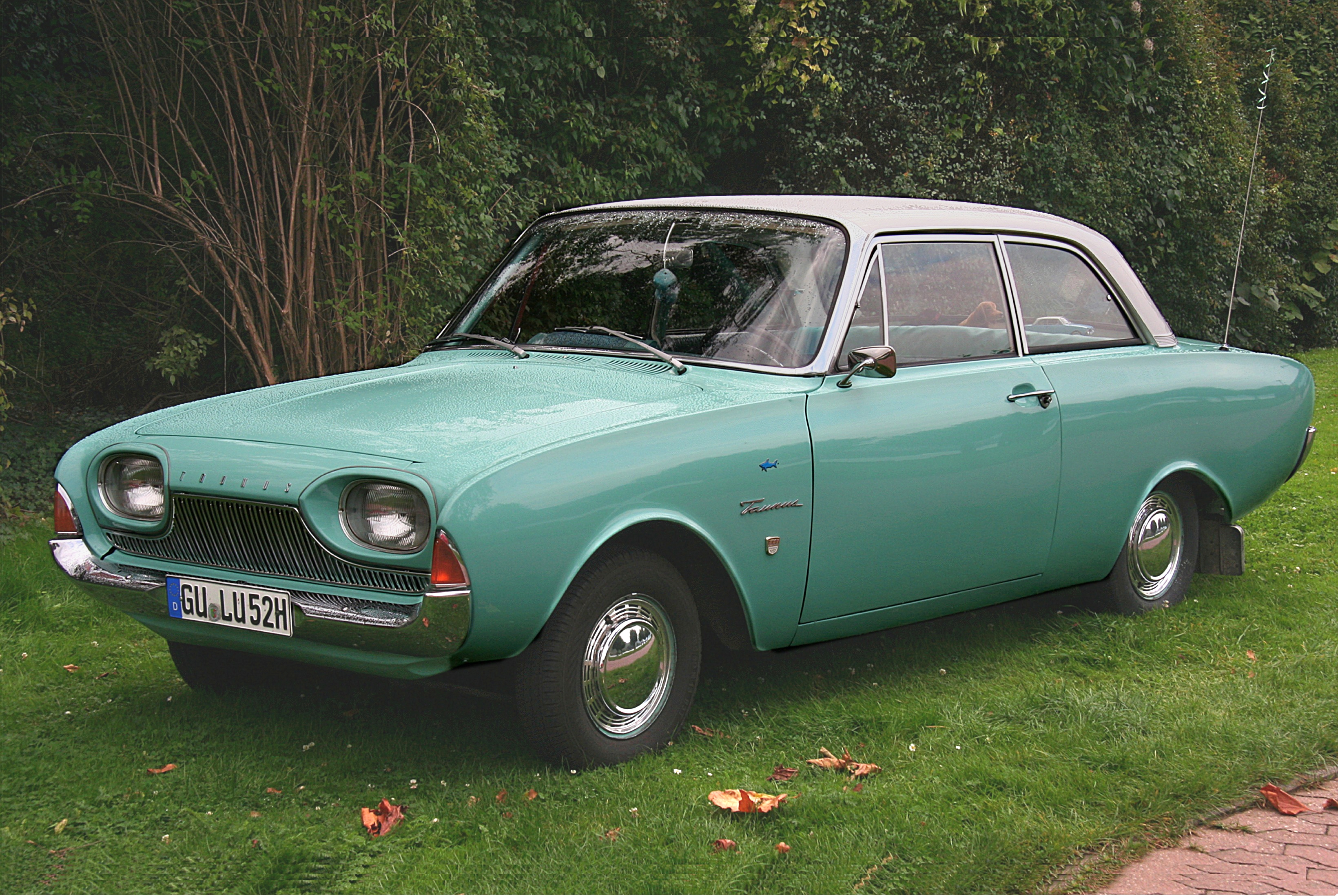 Ford 17 M (Baujahr 1963)